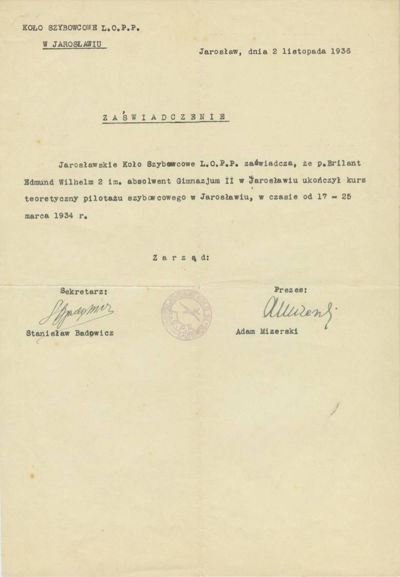 koło szybowcowe w Jarosławiu stwierdza, że Edmond Wilhelm Brillant ukończył kurs teoretyczny pilotażu szybowcowego